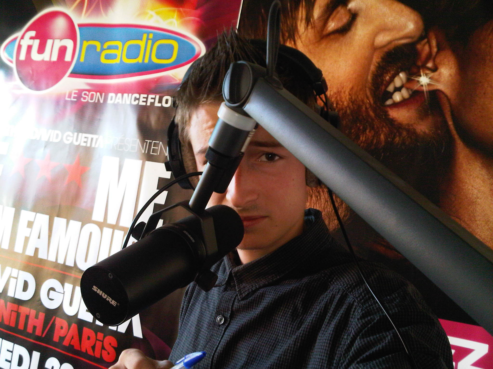 Cette photo de Vincent Gorlier a été prise au moment d'un enregistrement d'une émission qu'il anime le matin sur Fun Radio réunion